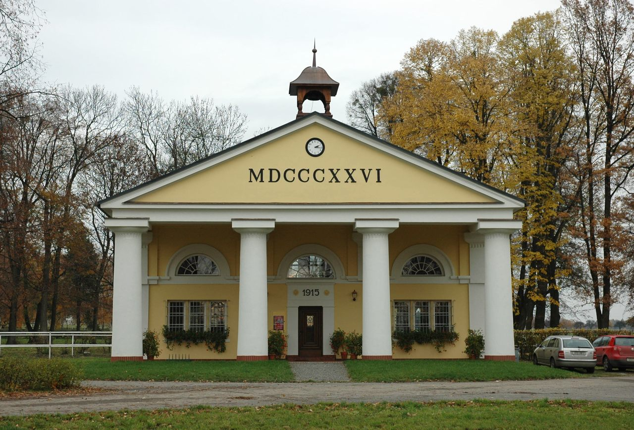 Zámeček na Albertovci, část Štěpánkovic